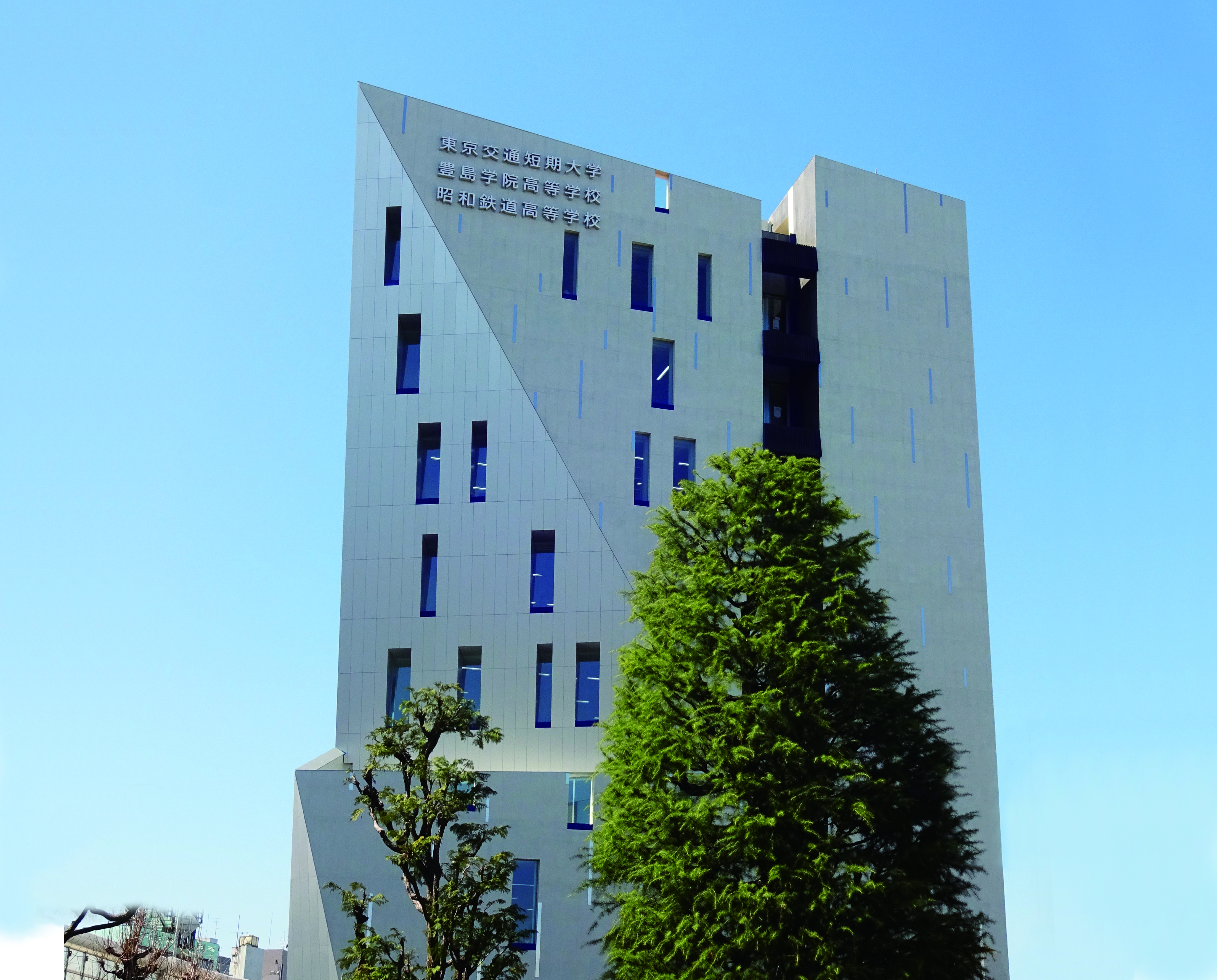 東京交通短期大学の新校舎です。2018年4月4日に竣工されました。